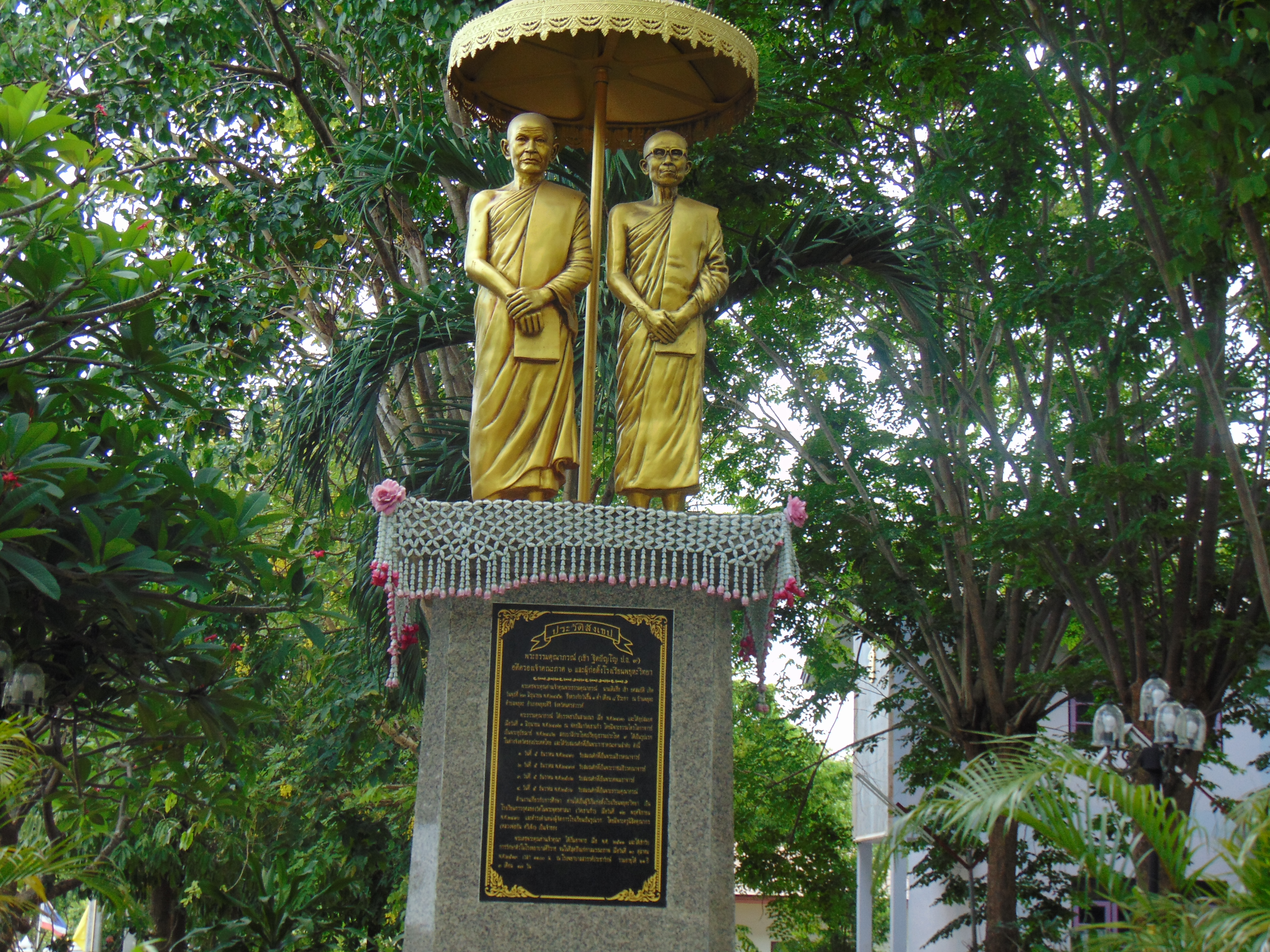 รูปปั้นเหมือนพระครูนิสิตคุณากรและพระธรรมคุณาภรณ์ ตั้งอยู่ ณ ทางเข้าโรงเรียนพยุหะวิทยา